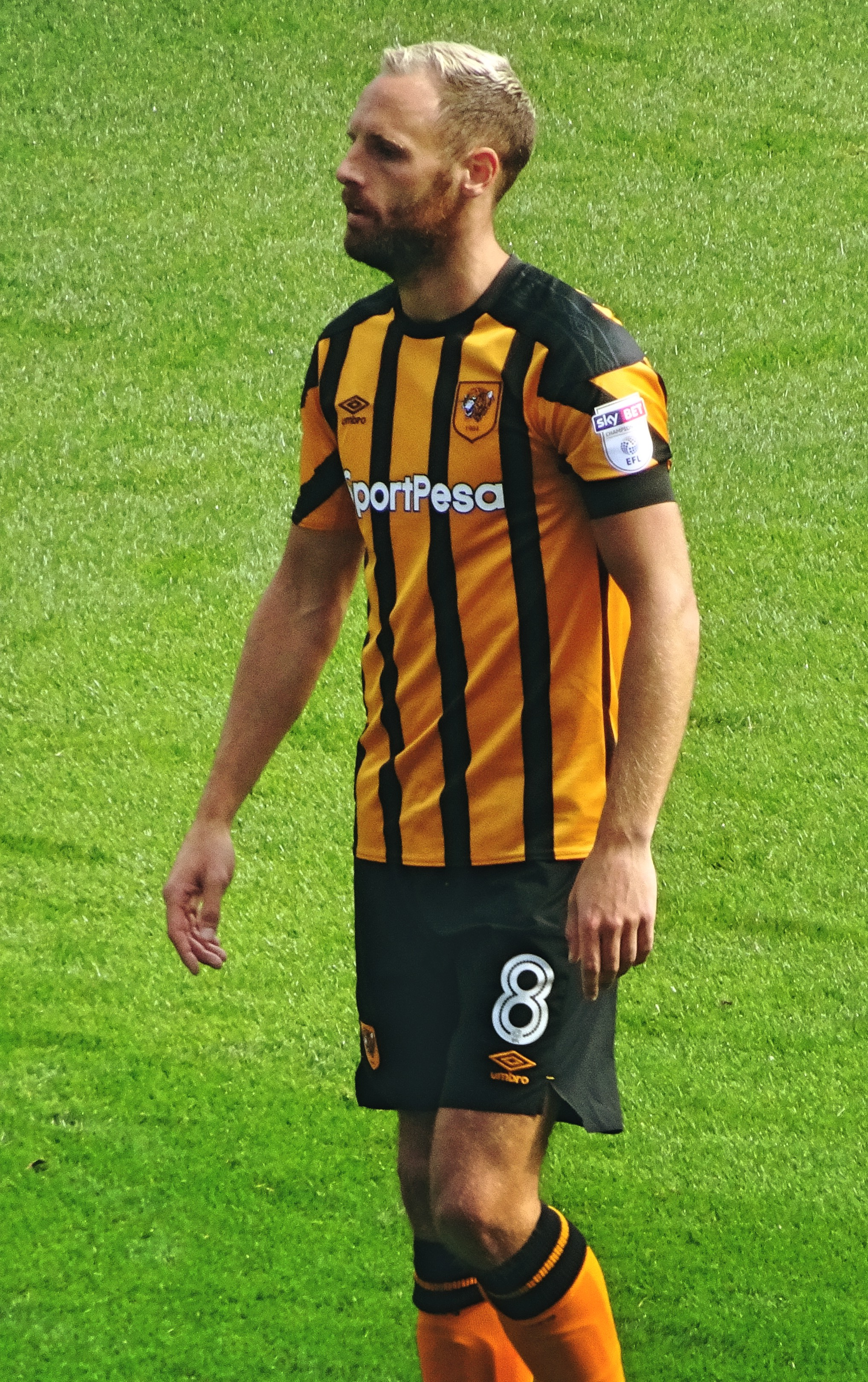 David Meyler